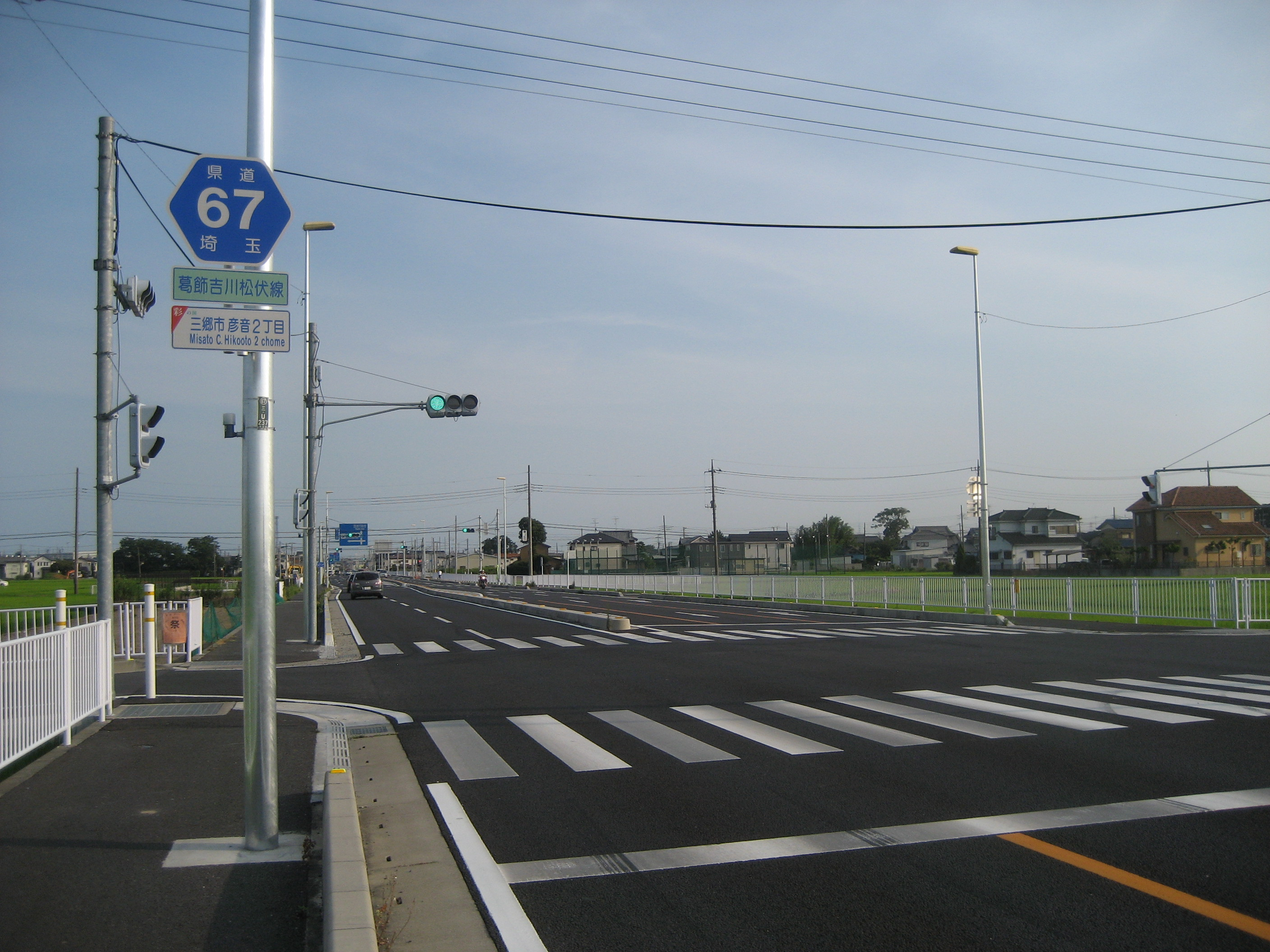 埼玉県道67号線三郷市彦音2丁目（外環道方面を撮影）